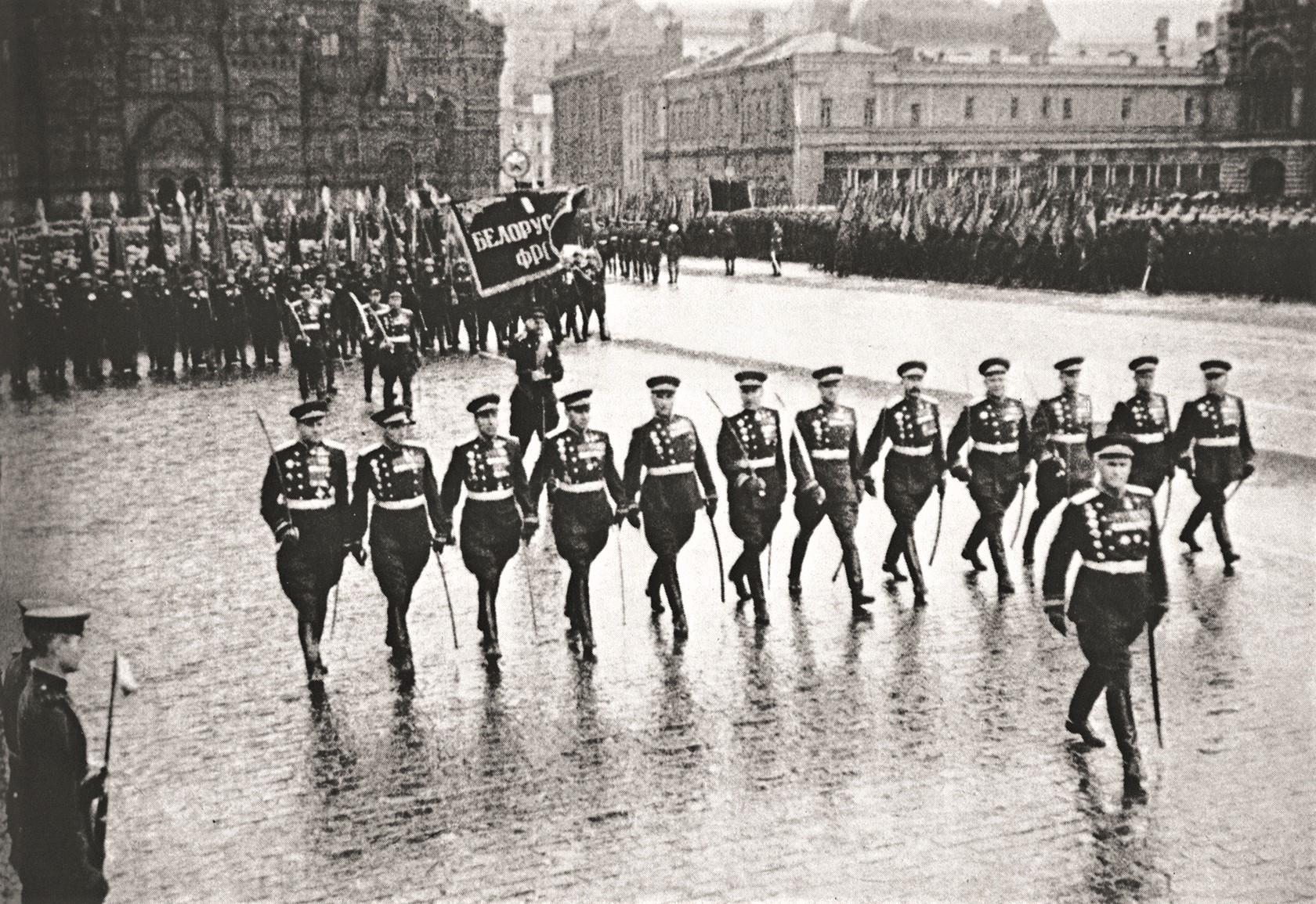 Генерал армии В. Д. Соколовский на Параде Победы на Красной площади в Москве